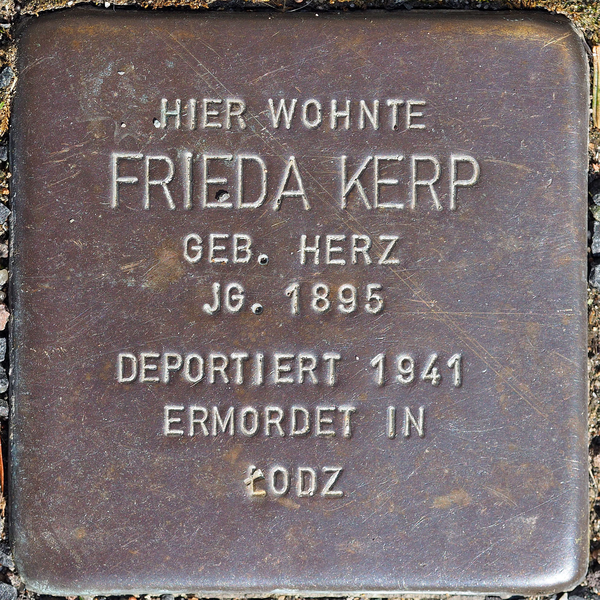 Stolpersteine MG: Kerp, Frieda